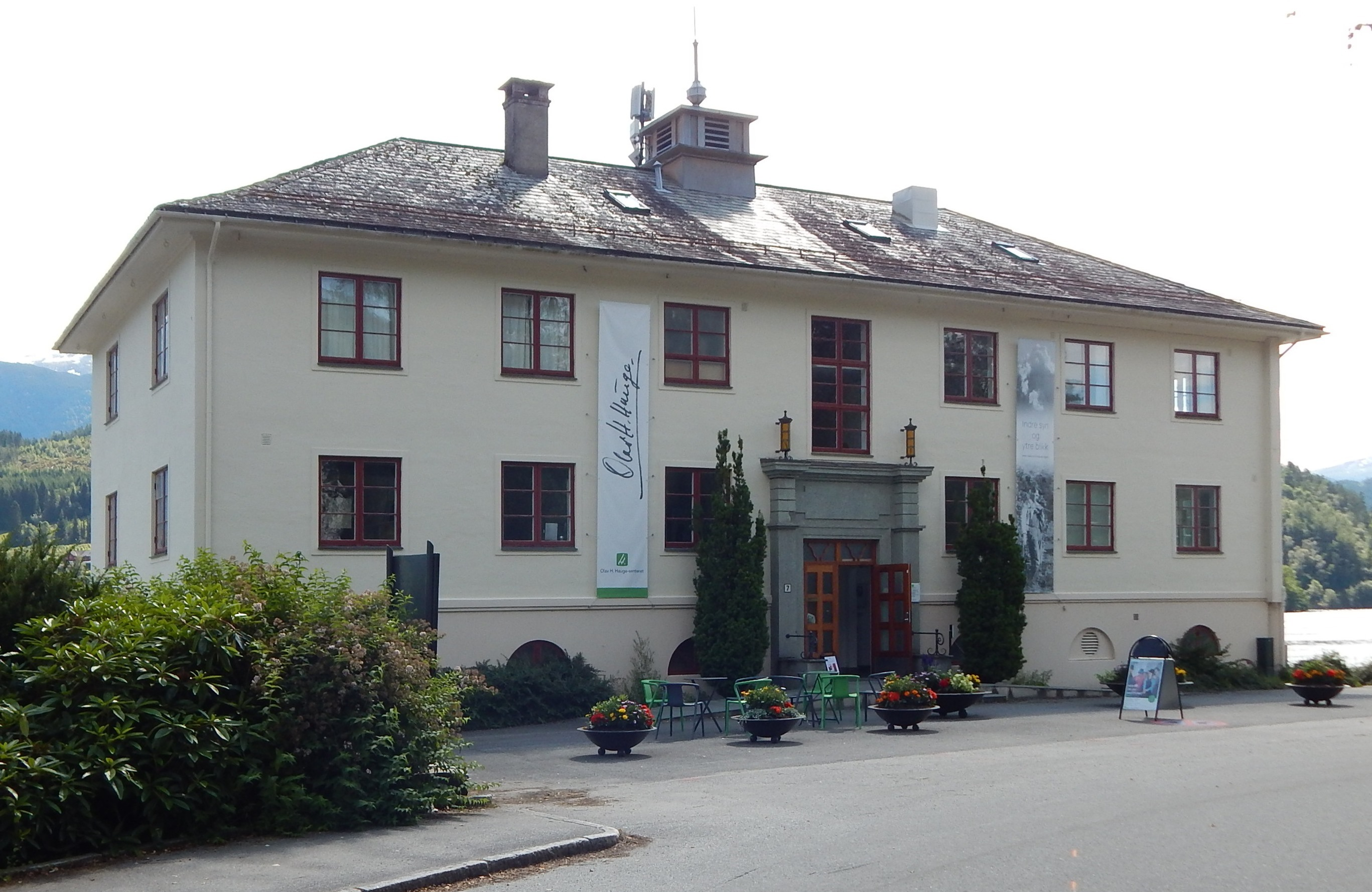 Olav H. Hauge-senteret i Ulvik